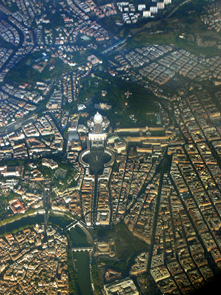 Vue aérienne de la cité du Vatican, à Rome.